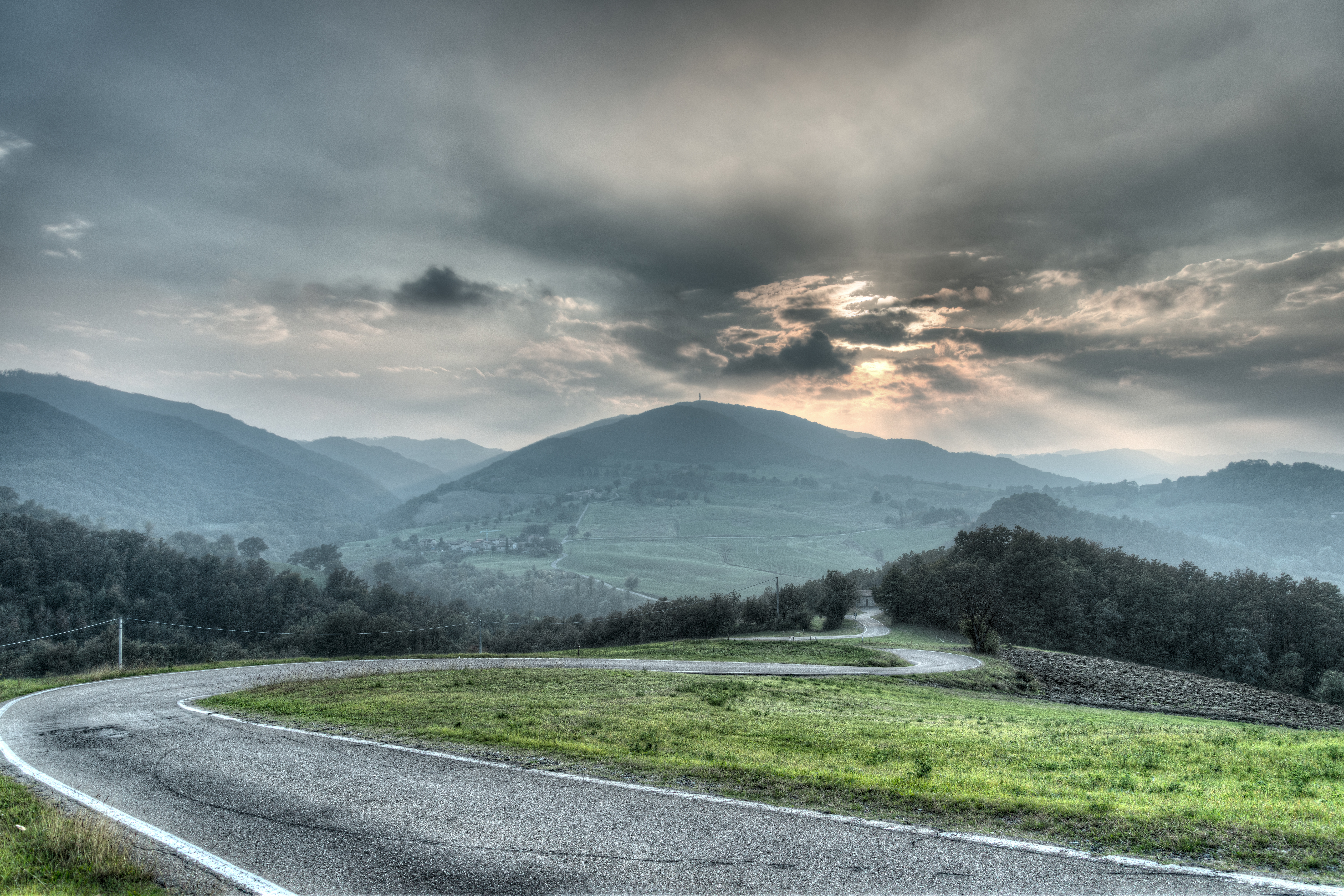 Strada Provinciale 74 - Regnano, Viano, Reggio Emilia, Italia